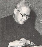 中文（台灣）: 方擎進士照片